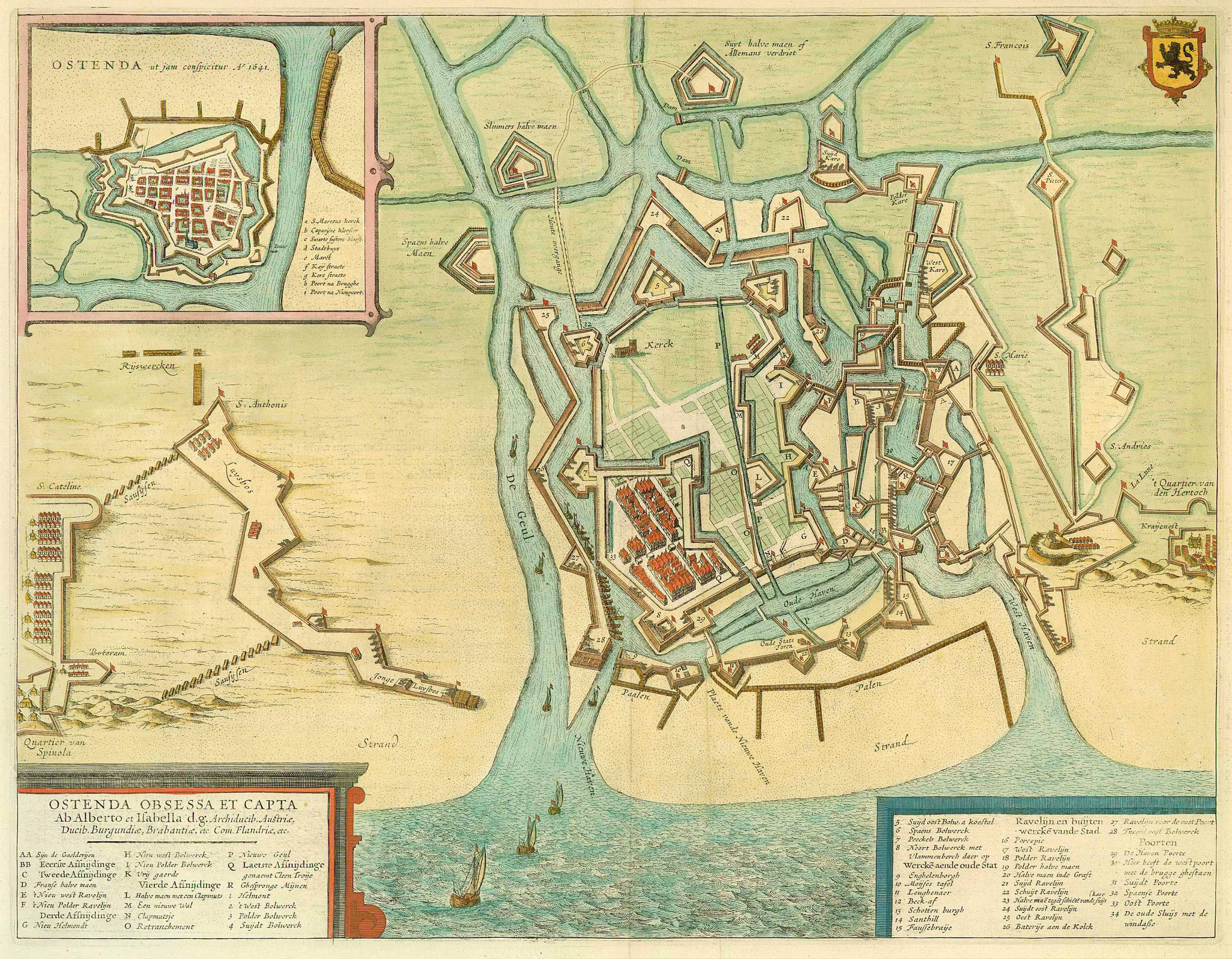 Mapa del sitio de Ostende de 1601 - 1604.